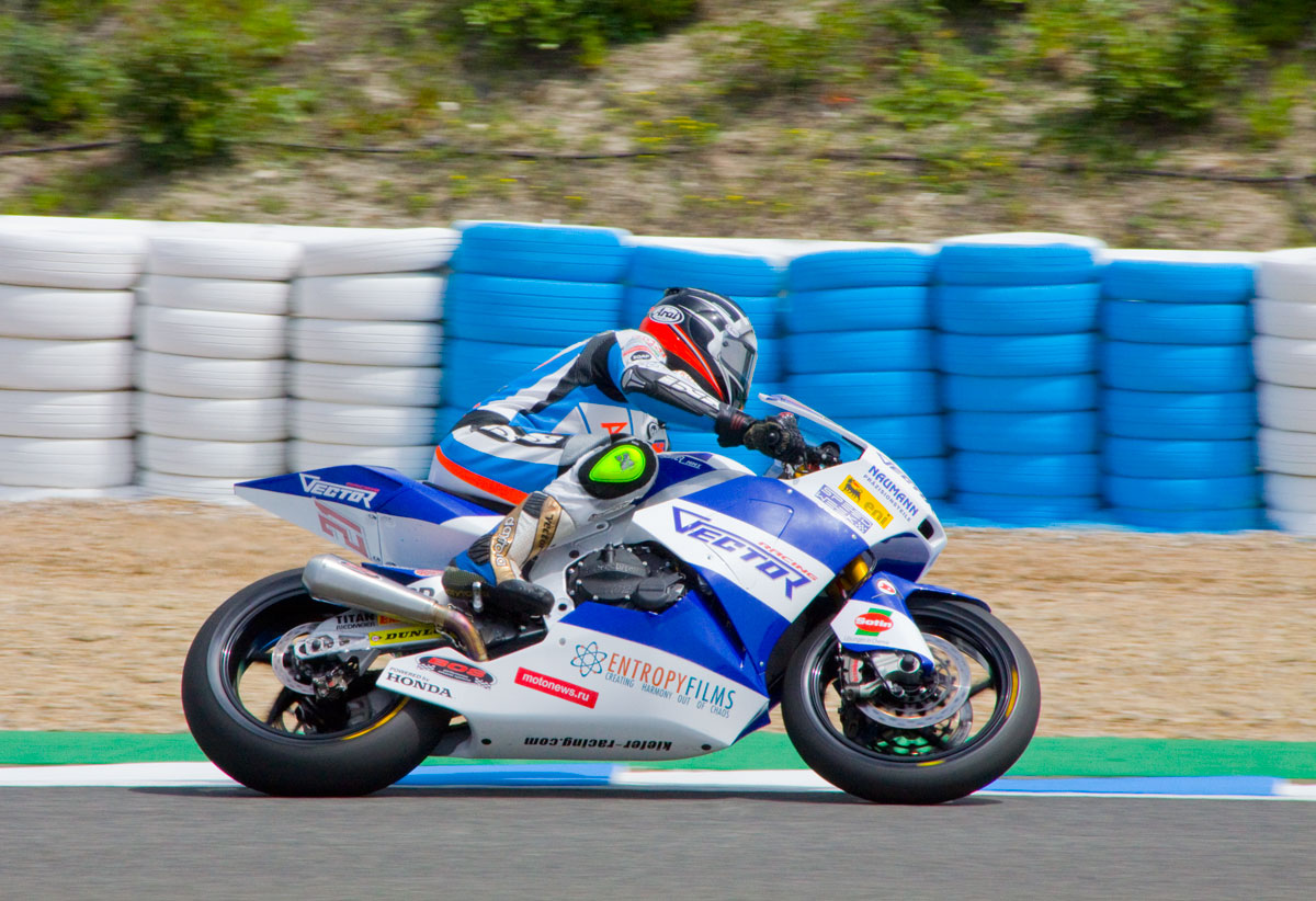 Motonews.ru: Владимир Леонов на мотоцикле Moto2...